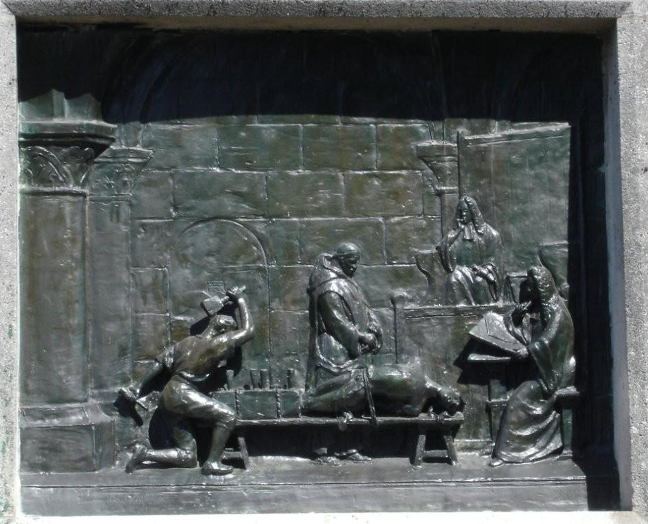 Détail du Monument Labarre à Abbeville (plaque de bronze)